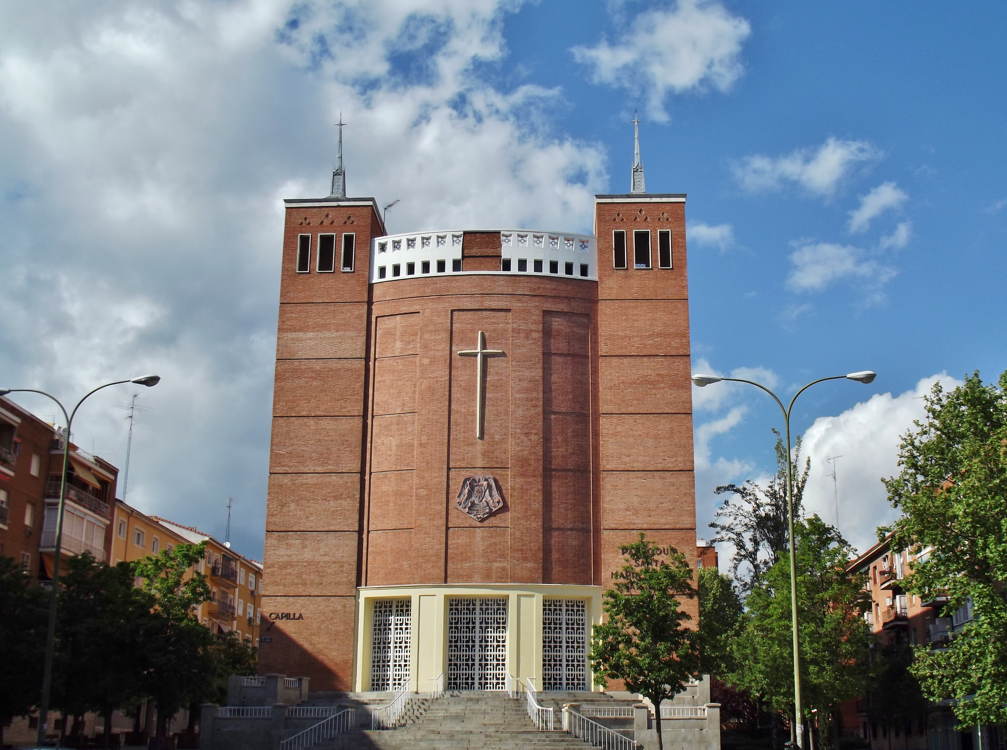 Parroquia de Santa Micaela y Santa Basilisa, Madrid.